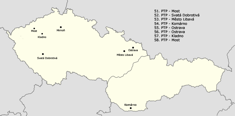 Dislokace pomocných technických praporů (PTP) na podzim 1951. Zdroj: Bílek Jiří, Pétépáci aneb Černí baroni úplně jinak, Elipsa 1996.